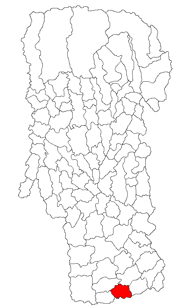 Categorie:Hărţi ale judeţului Argeş